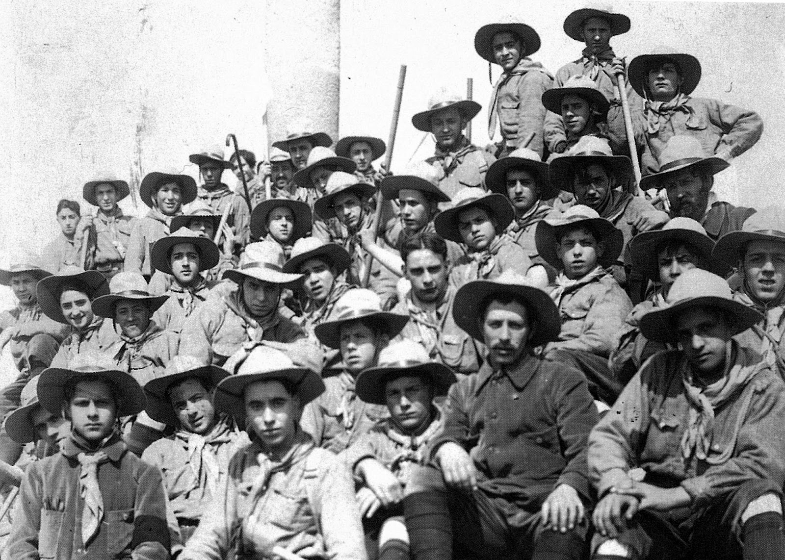 Exploradores Barceloneses, agrupación de los Almacenes "El Siglo" en Santa Creu d’Olorda (1913). El instructor es Ramón Soler i Lluch.